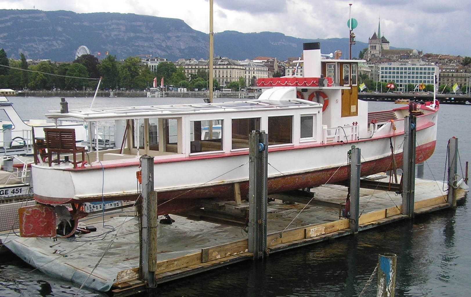 « La Bécassine », bateau électro-solaire de la compagnie « Swissboat », à Genève. Inauguré en 2001, alors propriété de la Société des Mouettes Genevoise Navigation SA (SMGN).